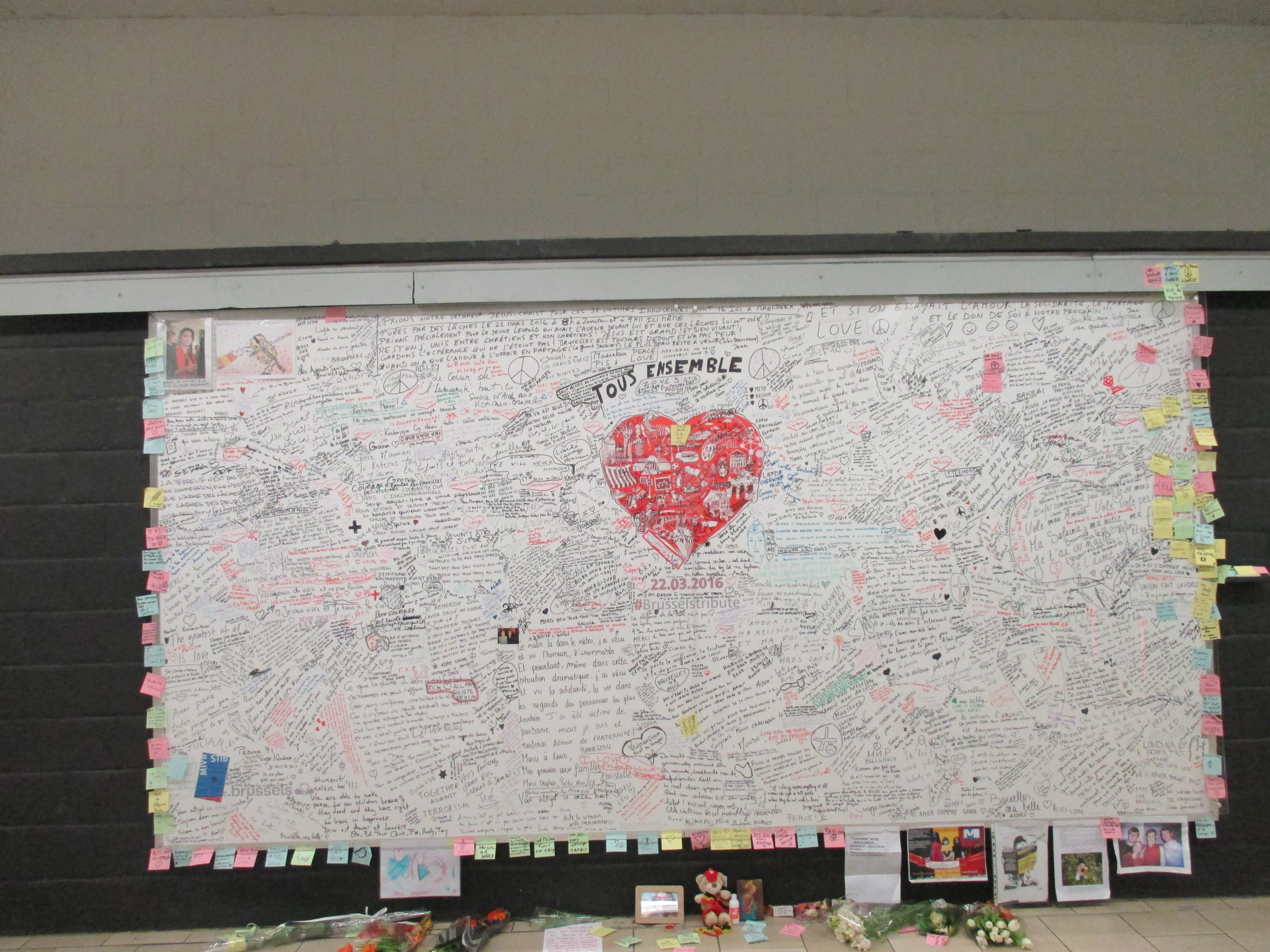 Mur du souvenir pour les victimes de l'attentat du 22 mars 2016 à Maelbeek. Il se situe dans la mezzanine de la station de métro Maelbeek.